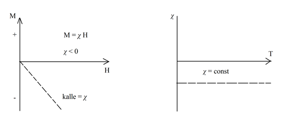 Magneetumusvektori (M) sõltuvus magnetvälja tugevusest (H). Magneetilise vastuvõtlikkuse (χ) sõltumatus temperatuurist (T).